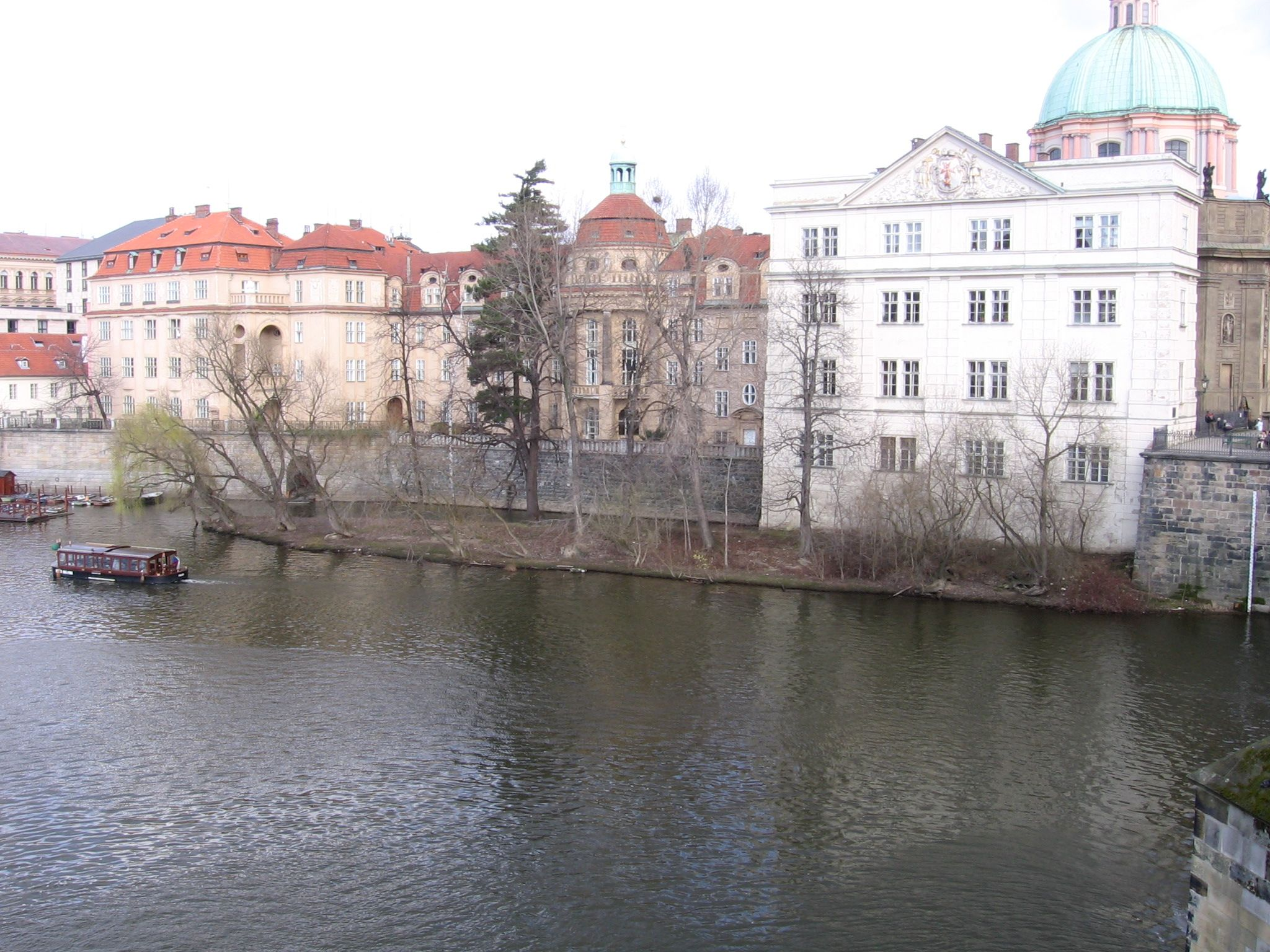 Česky: Křižovnický ostrov, pohled z Karlova mostu